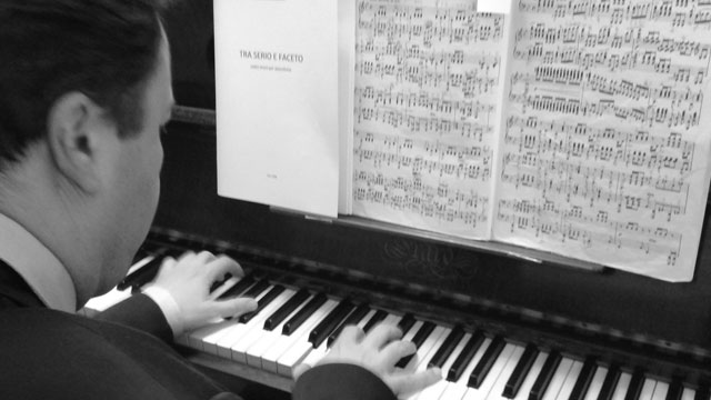 Il Maestro Maurizio Balzola